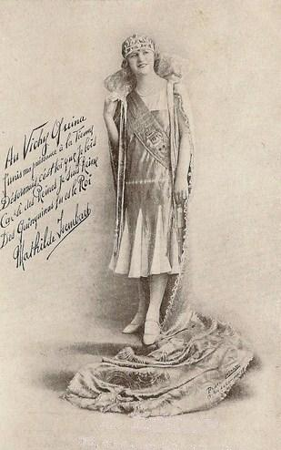 La Reine des Reines de Paris 1926 Mathilde Isembart pose pour une publicité de l'apéritif Vichy Quina au Quinquina.